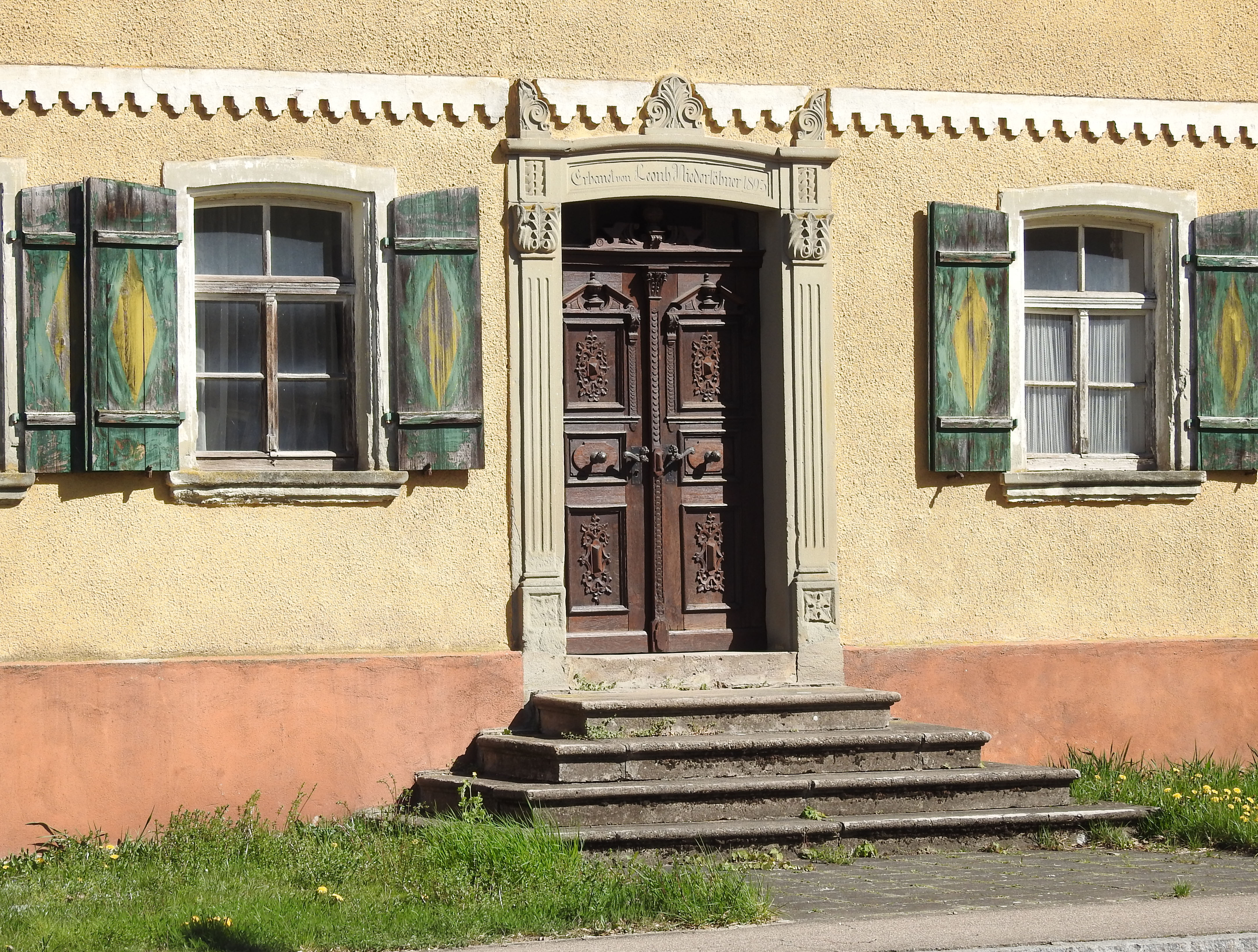 Obermögersheim 1, Wassertrüdingen, Portal